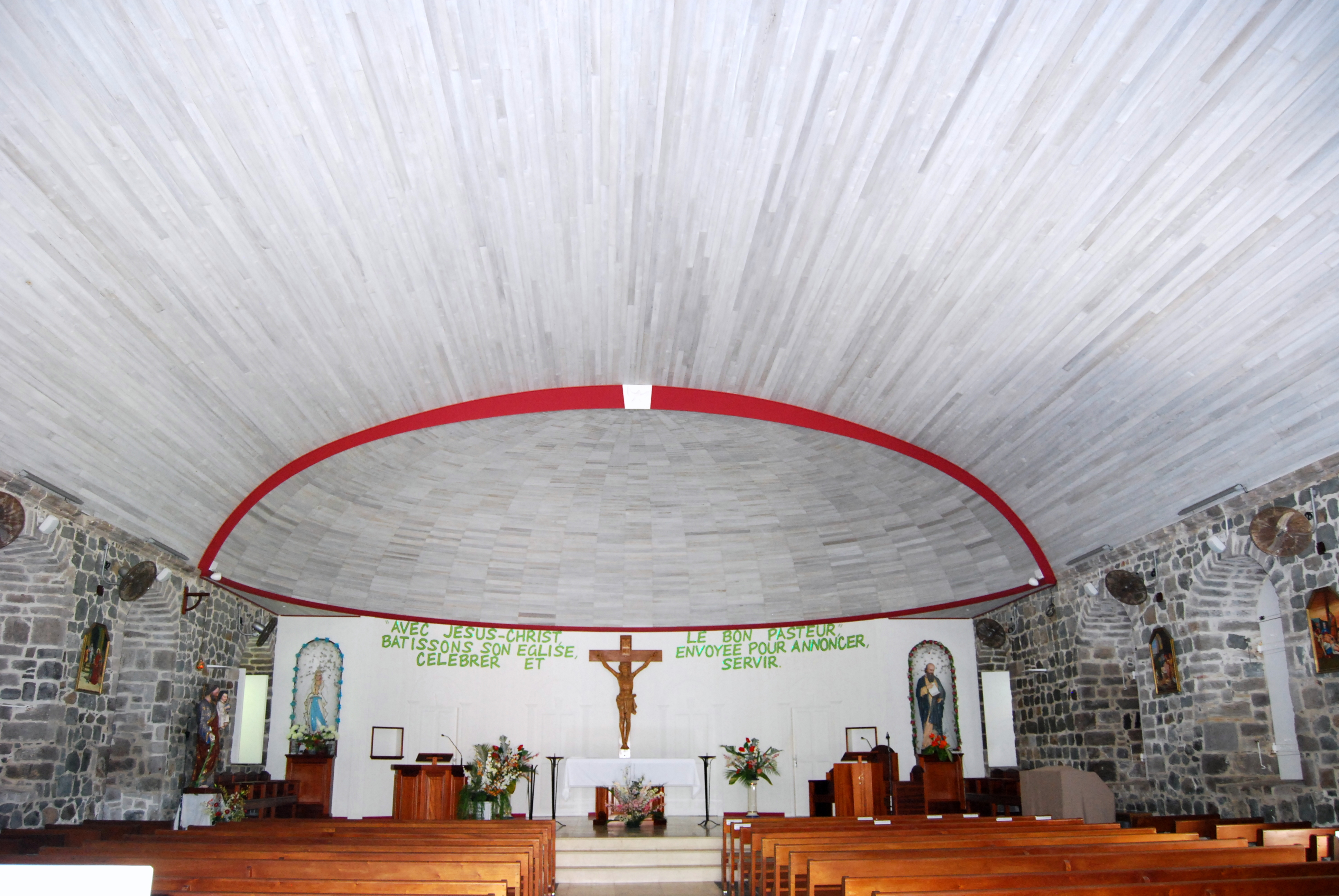 Église catholique de Gustavia, Rue de l'église, Gustavia (inscrit, 1995) .